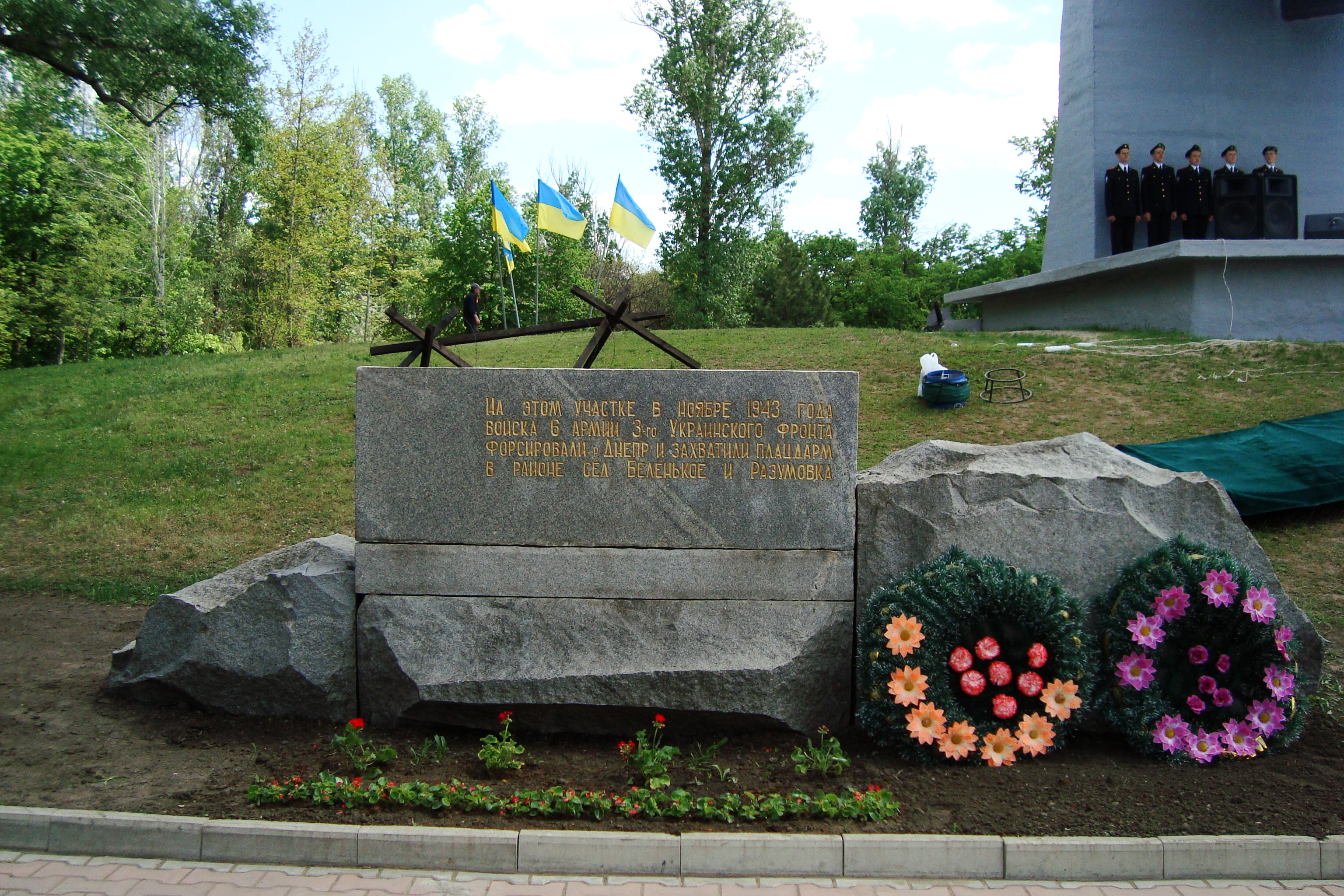 Запорожье. На месте Переправы в октябре 1943 советских войск, плацдарм на берегу Днепра, с которого развилось наступление положившее начало освобождения Запорожья и правобережной Украины, установлен памятник, который в 2010 обновлён.